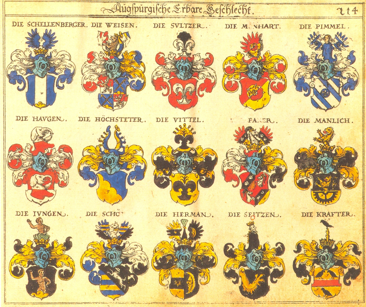 Augsburgische Ehrbare Geschlecht